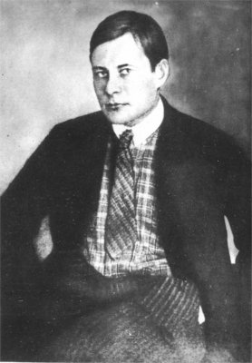 Йогансен Майк Гервасійович - український поет, автор пригодницьких романів. Один із засновників письменницької групи ВАПЛІТЕ. Представник розстріляного відродження.